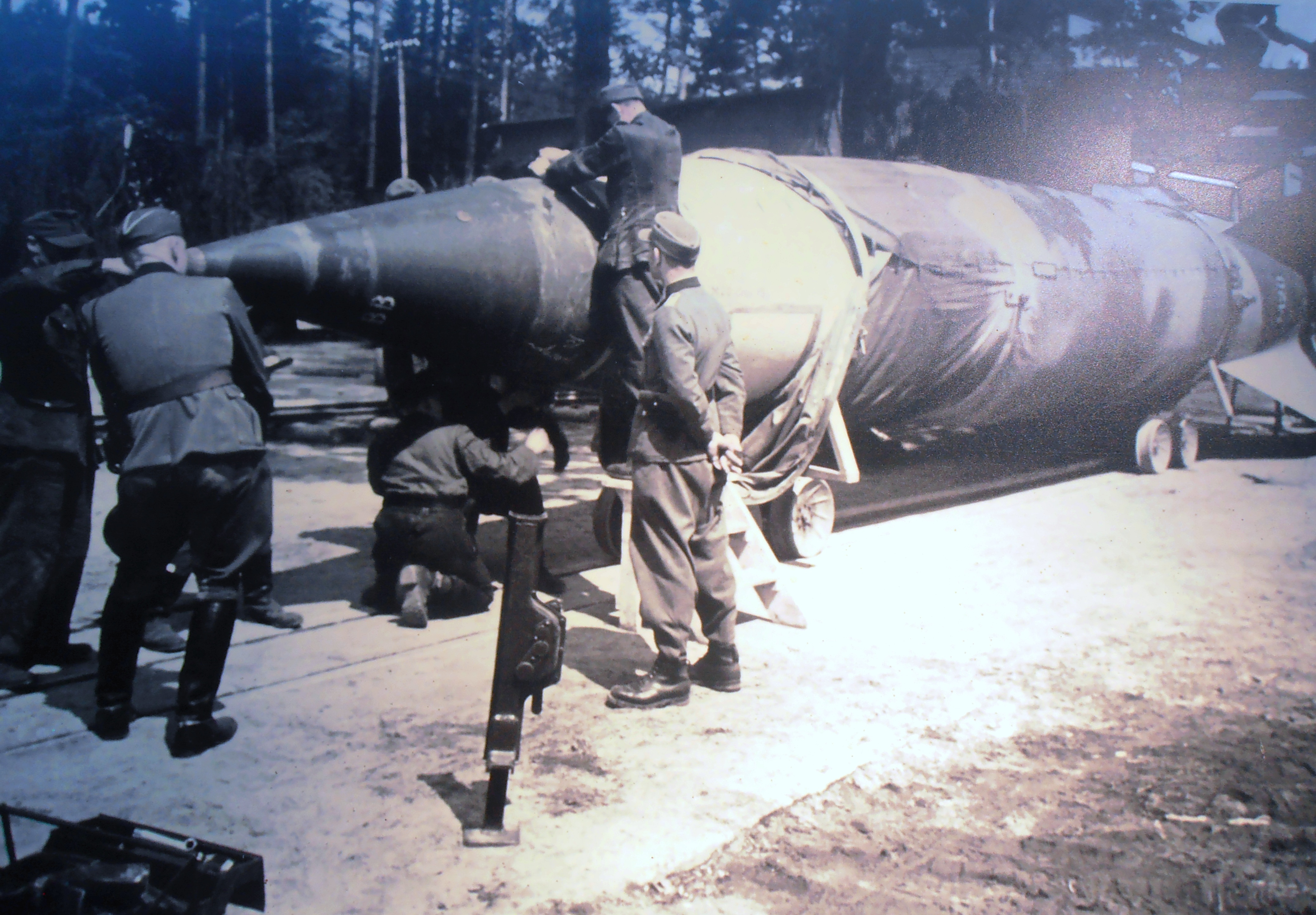 Montaż głowicy rakiety V-2 przed odpaleniem z poligonu w Bliźnie. Zdjęcie pochodzi z ekspozycji w Parku Historycznym Blizna.